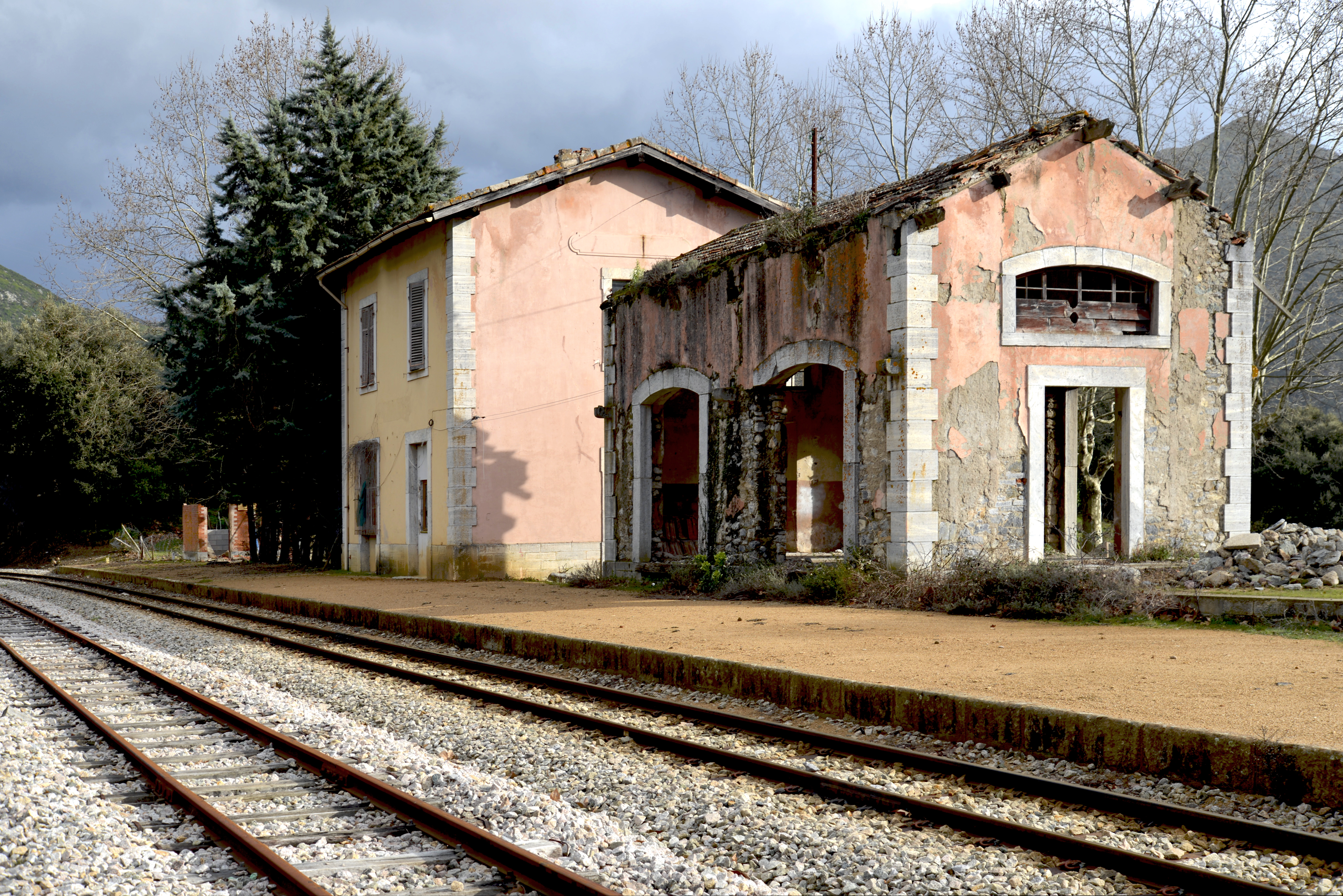 Soveria, Talcini (Haute-Corse) - L'ancienne gare de Soveria désaffectée